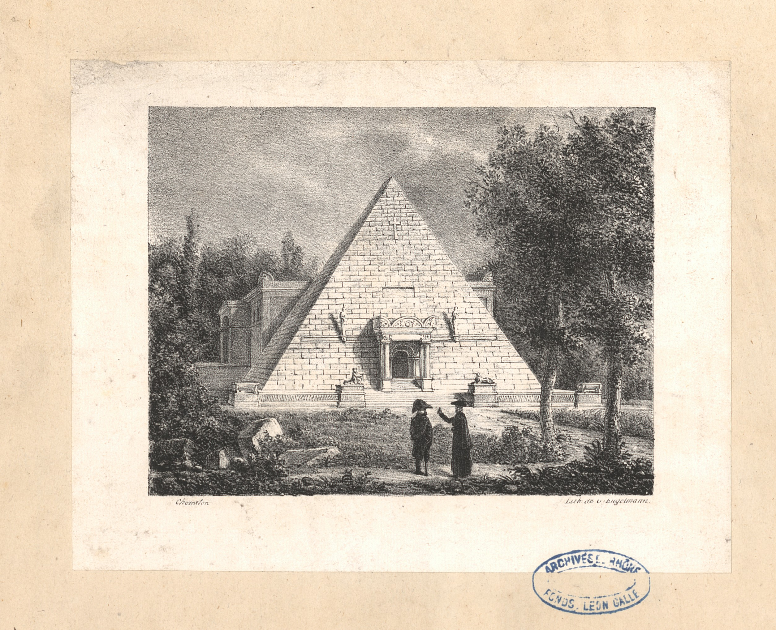 Archives du département du Rhône et de la métropole de Lyon, Fonds Galle, FG/A114